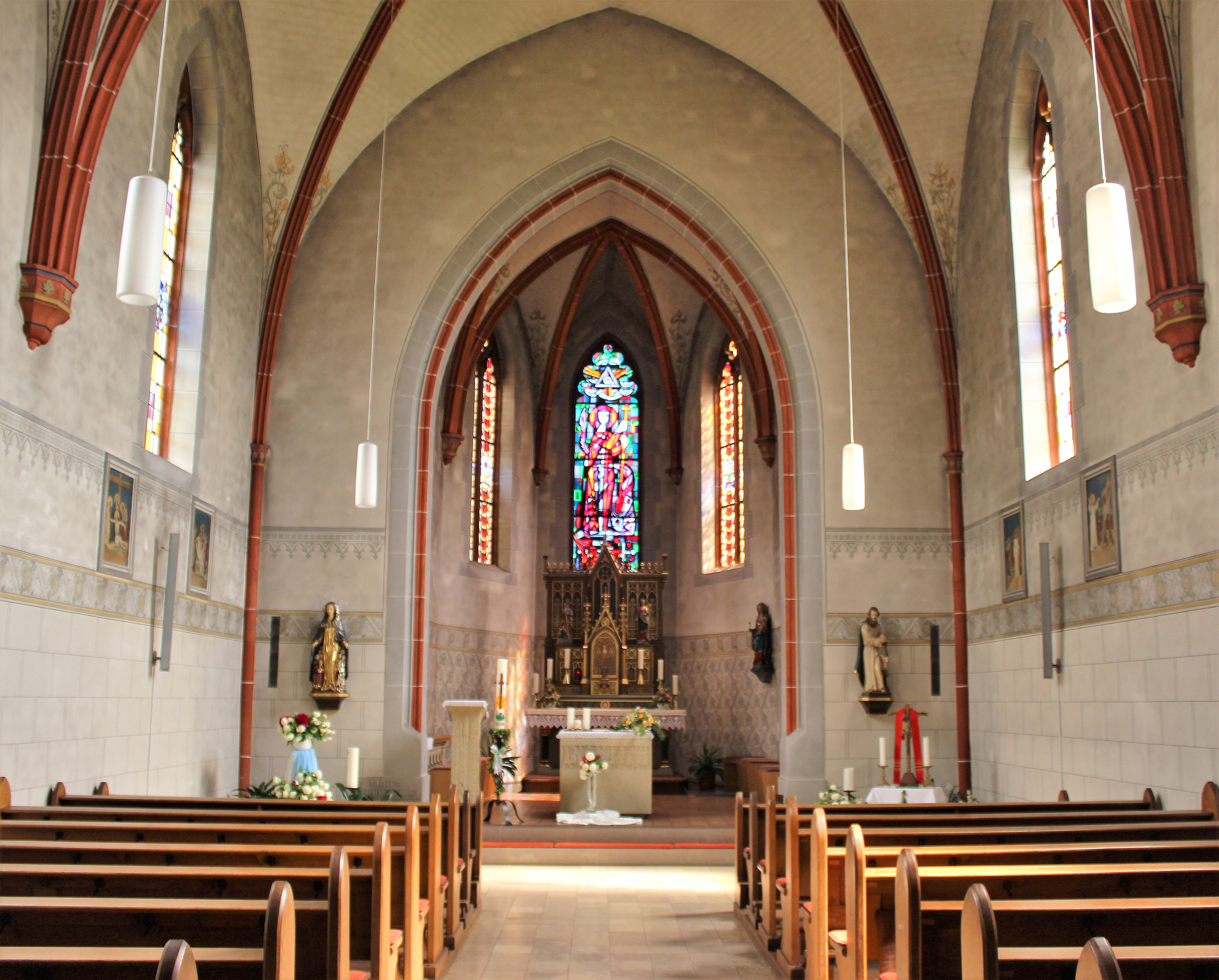 Blick ins Innere der katholischen Kirche St. Margareta in Eimersdorf, Gemeinde Rehlingen-Siersburg, Landkreis Saarlouis, Saarland